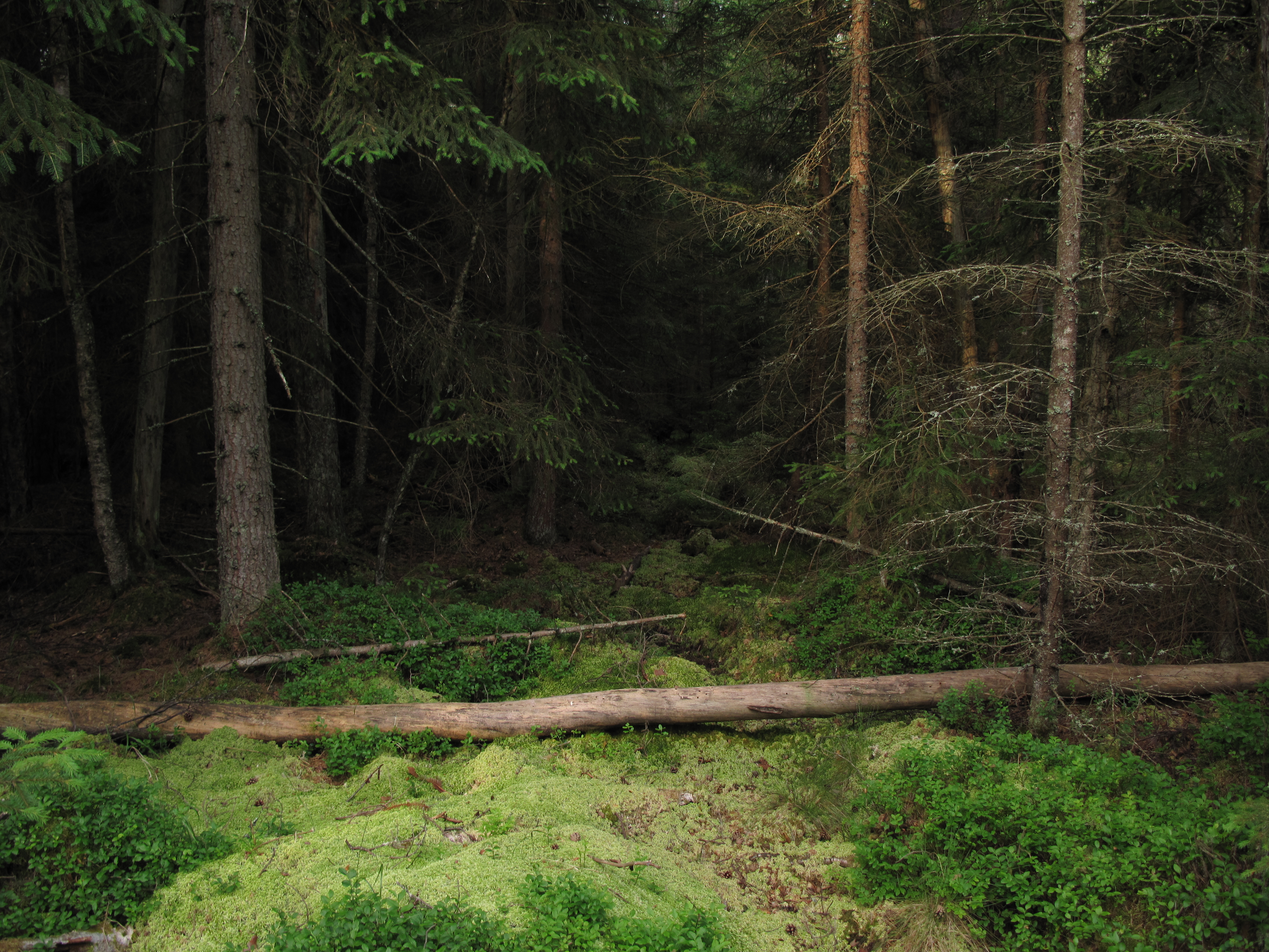 Národní přírodní rezervace Velká Niva. Okres Prachatice, Česká republika.